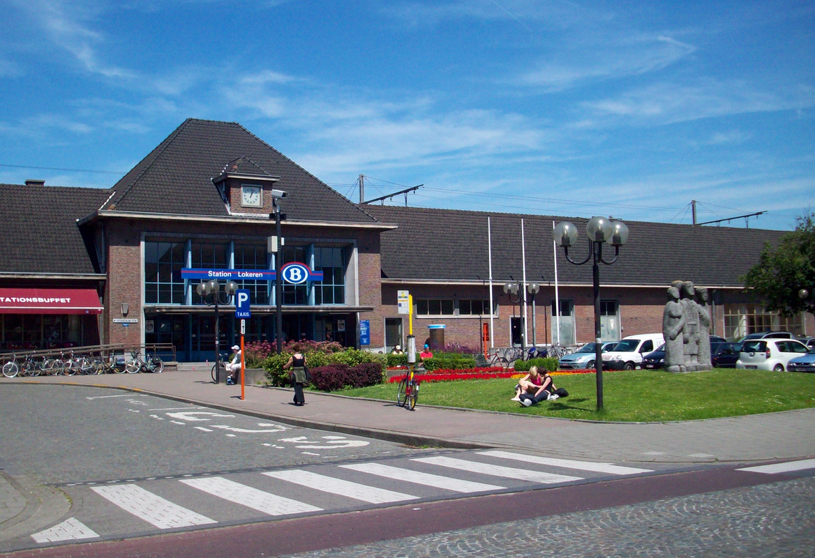 Station Lokeren